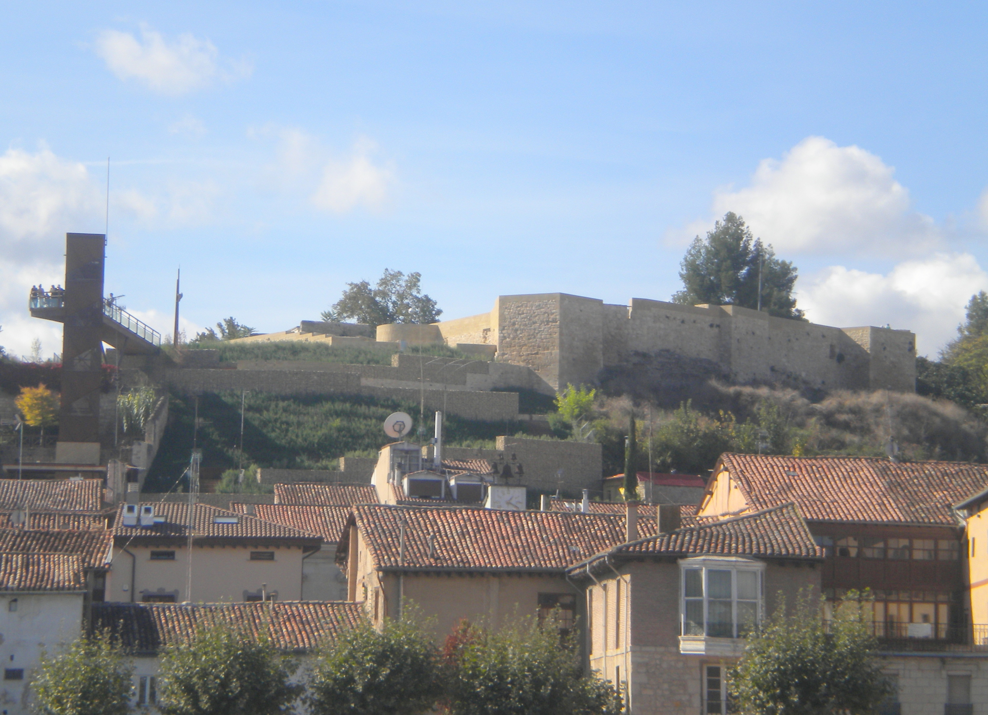 Vista general del Castillo de Miranda de Ebro (Castilla y León, España)